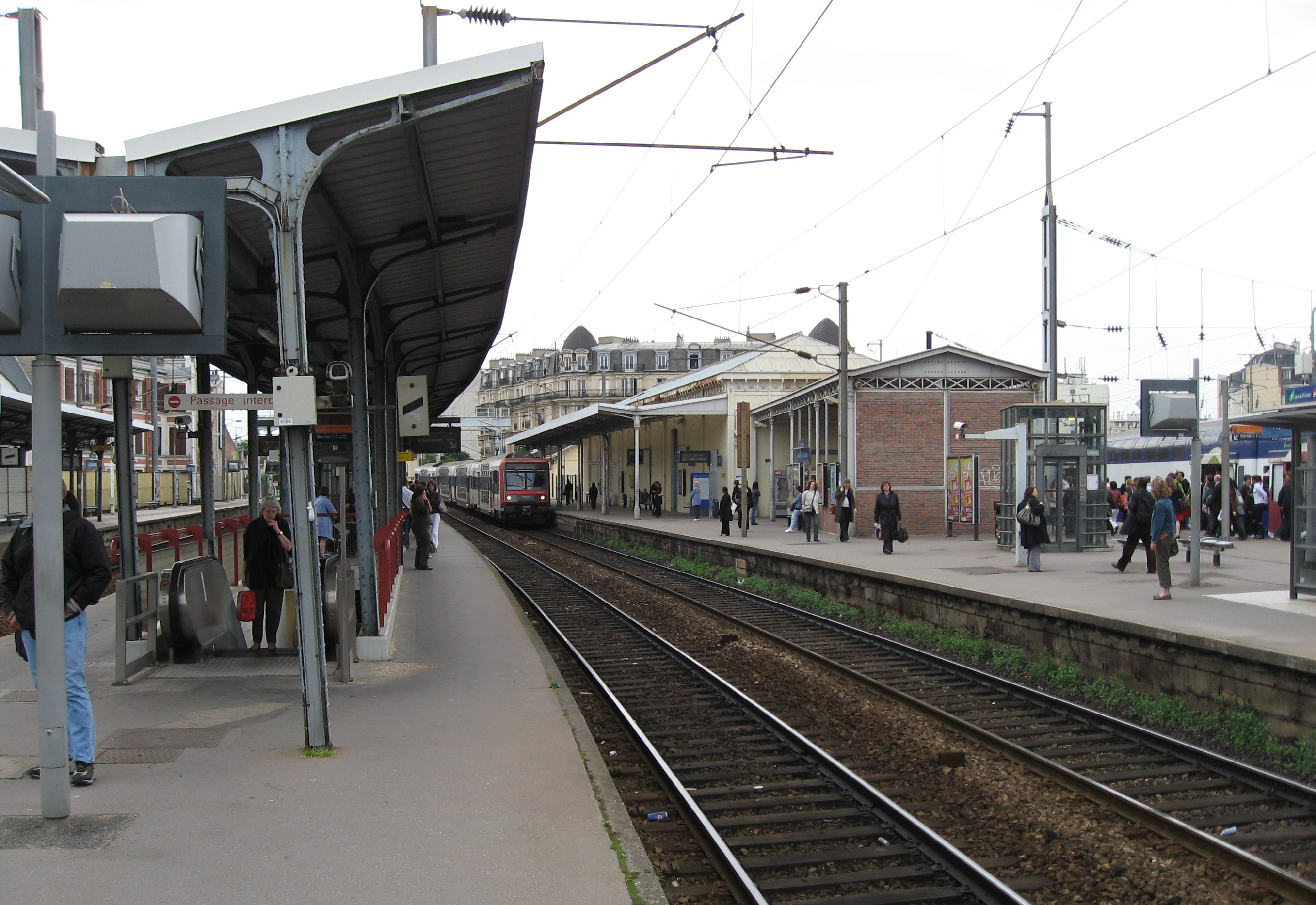 Gare d'Asnières-sur-Seine Map: 48° 54' 22" N 2° 16' 58" E